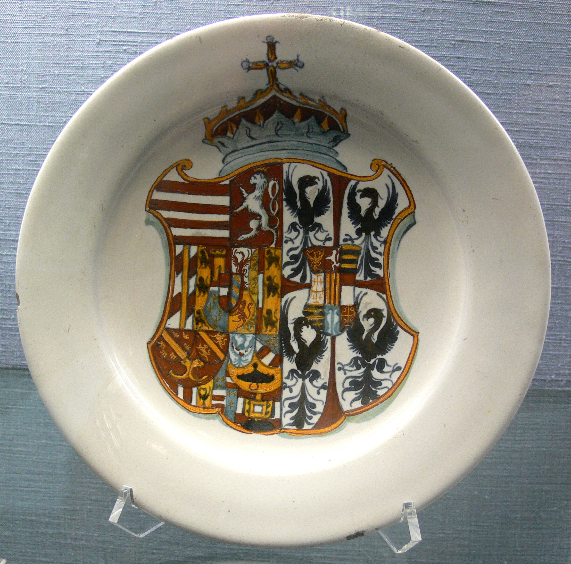 Teller mit Allianzwappen Habsburg / Gonzaga, Norditalien oder Südtirol, zwischen 1582 und 1595 Kunstgewerbemuseum Berlin, Inv. Nr. F 824b